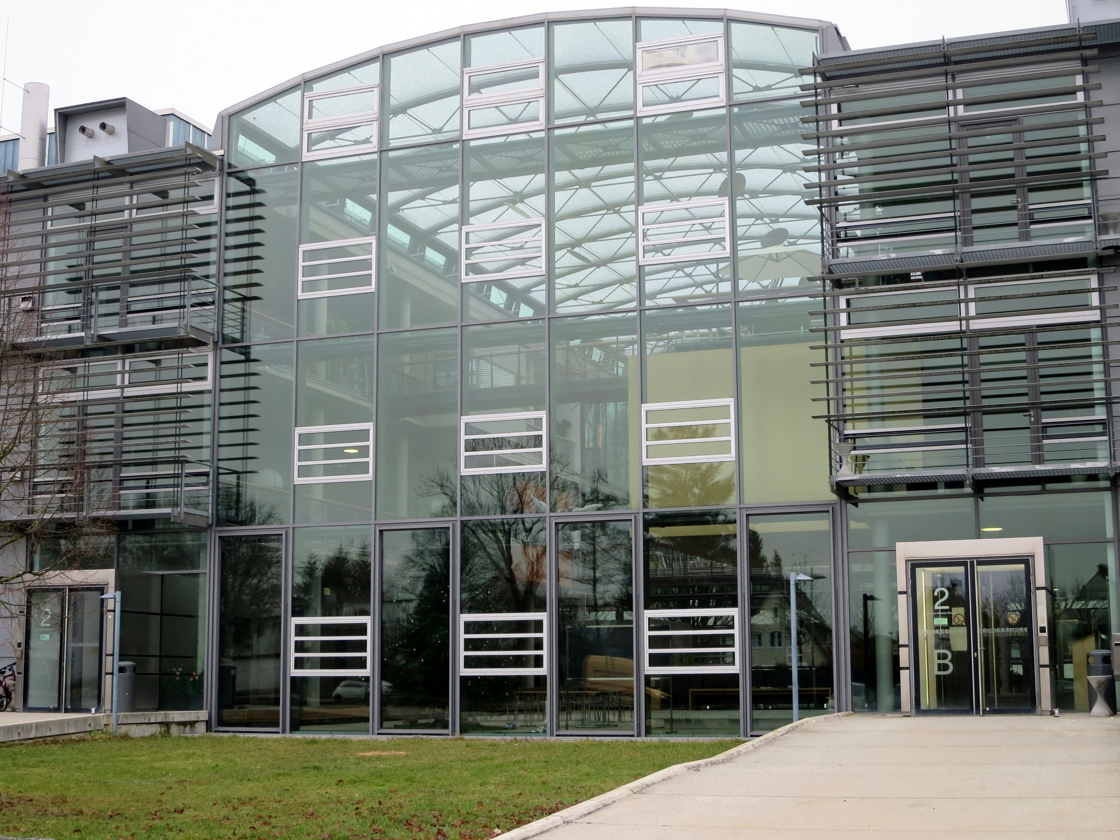 ZIEL - Zentralinstitut, Institute for Food & Health